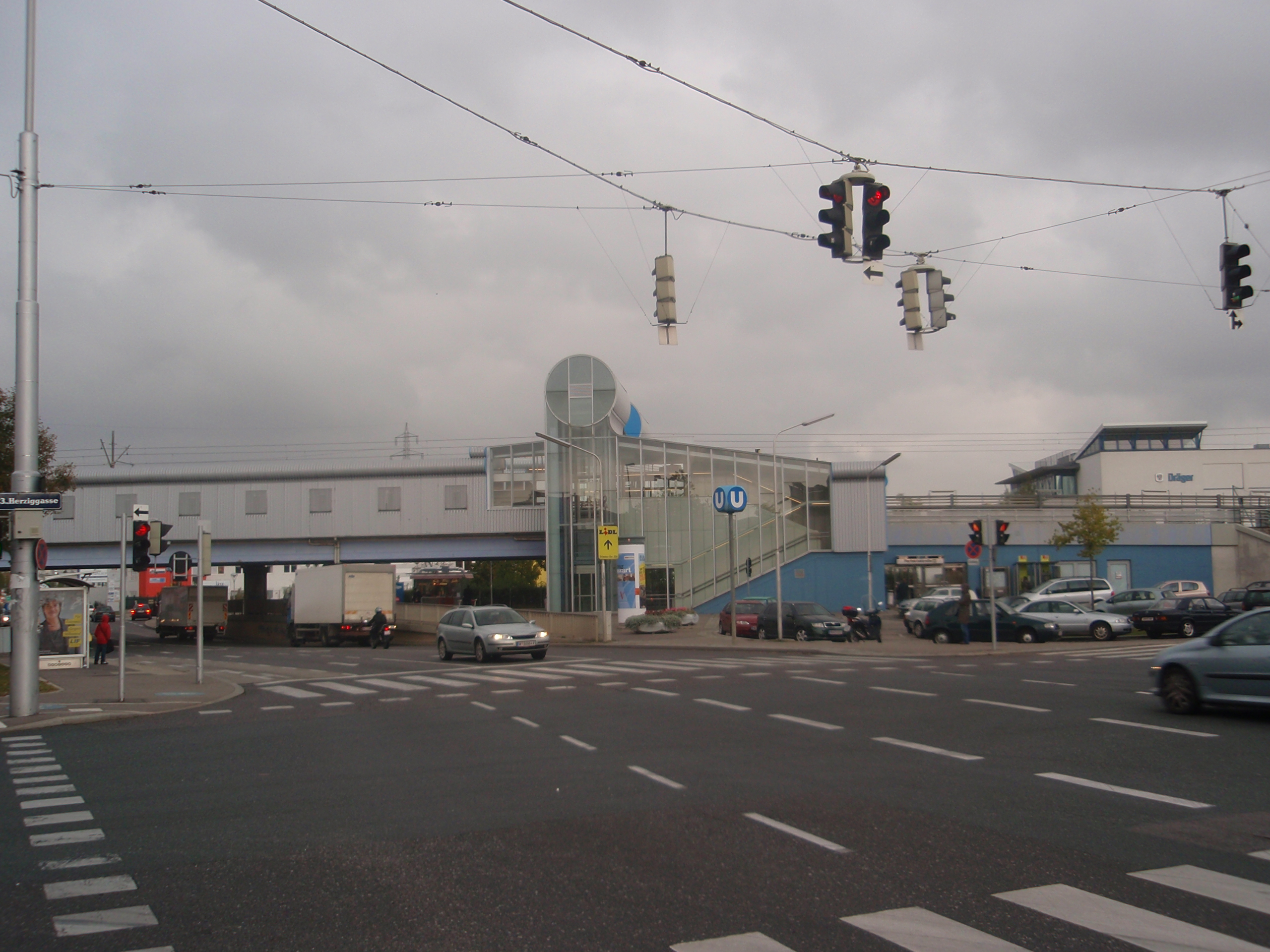 U6-Station Perfektastraße